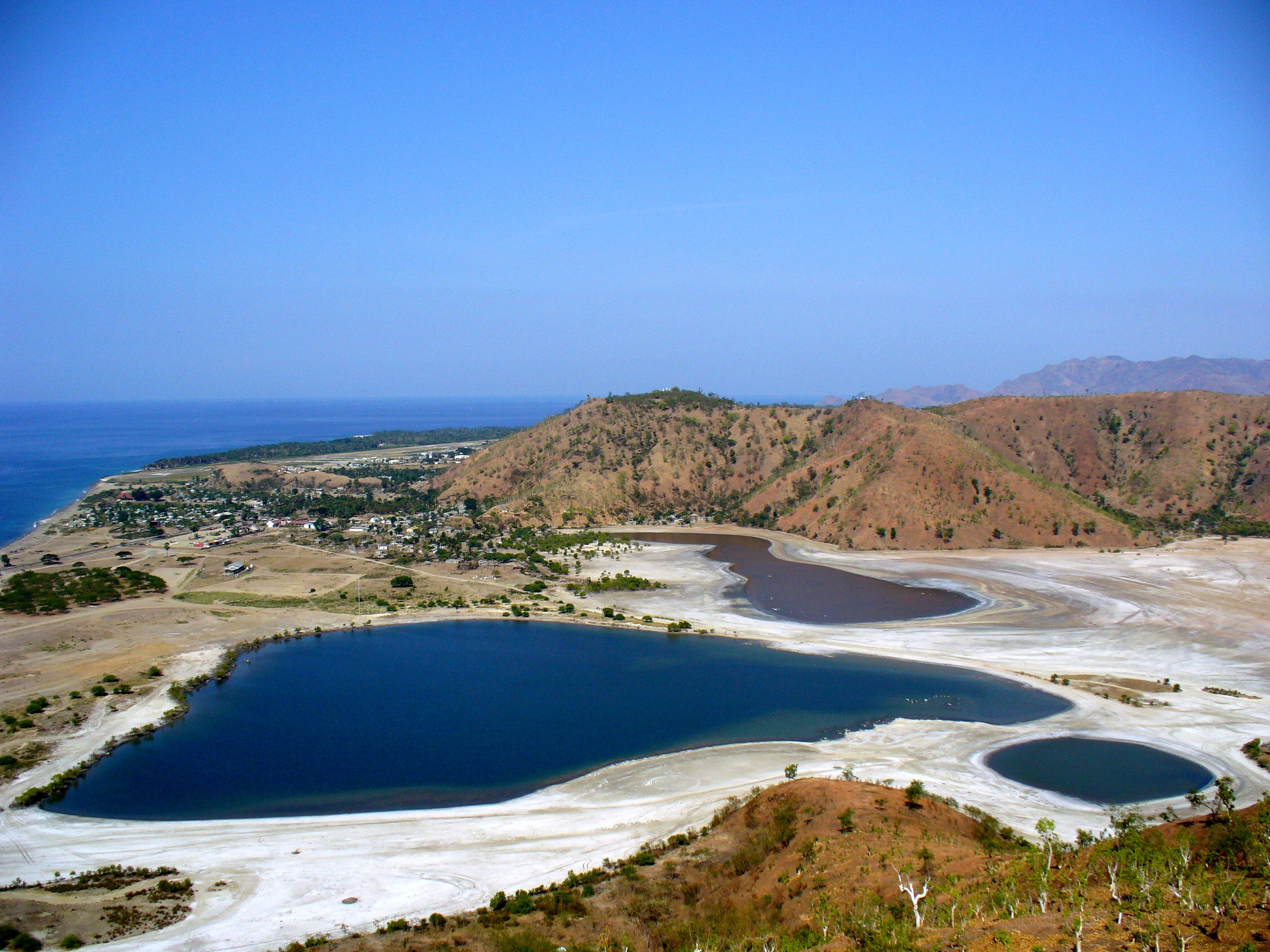 Tasitolu, Dili, East Timor